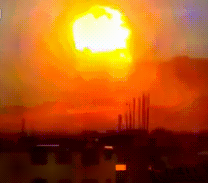 Взрыв авиационная вакуумной бомбы повышенной мощности